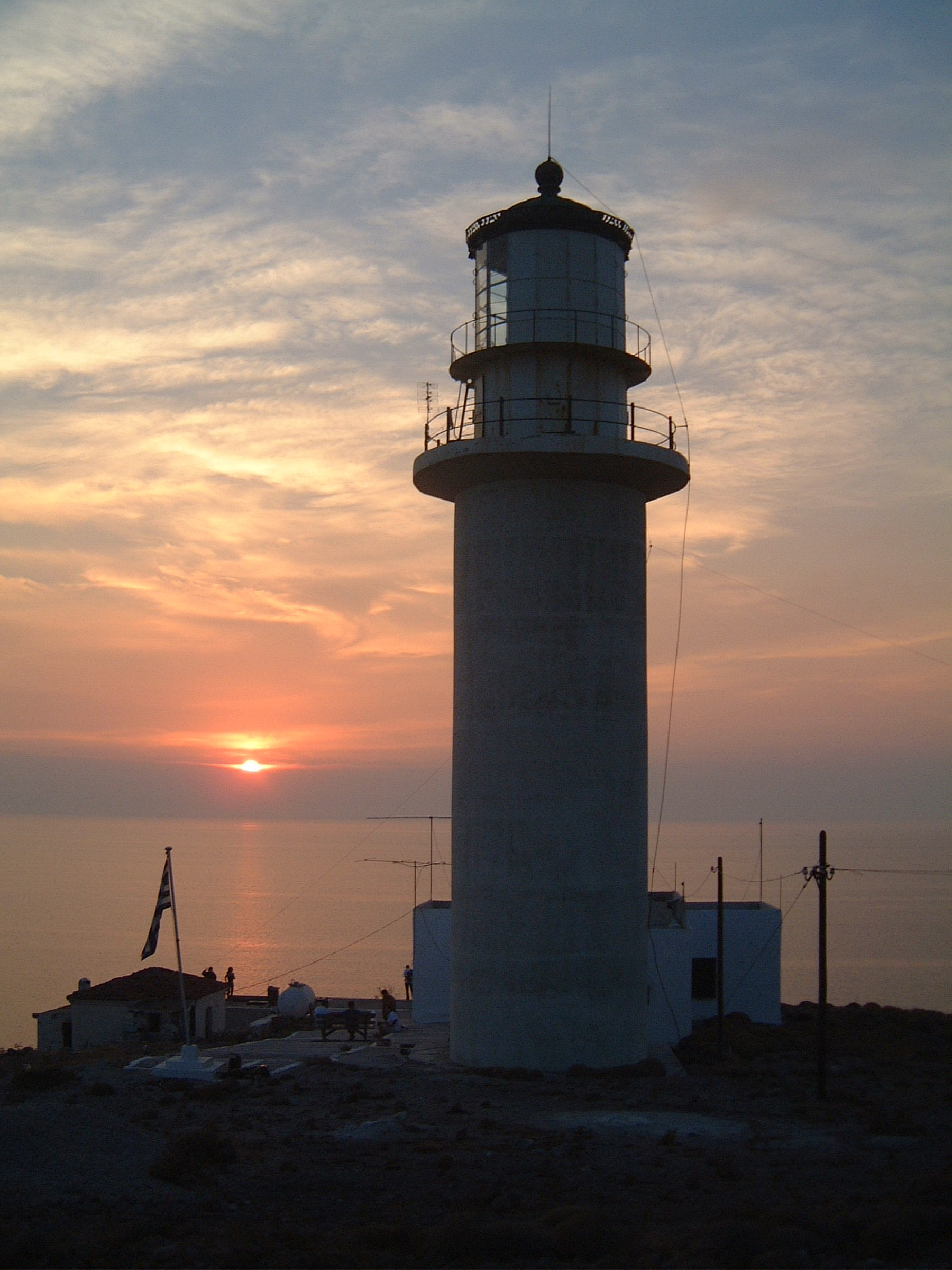 Nisiopi (Sigri) lighthouse